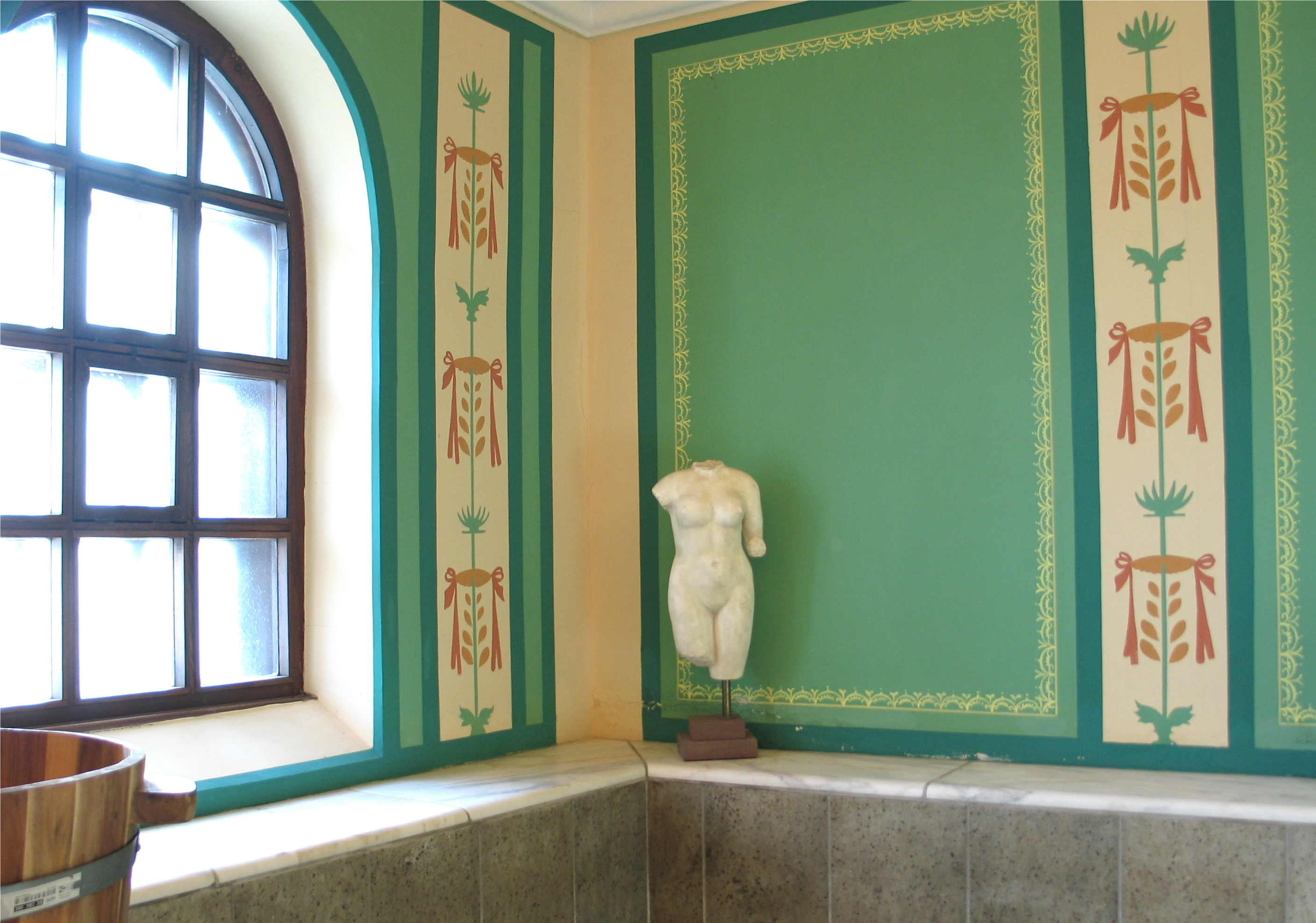 Römische Villa Borg, Caldarium